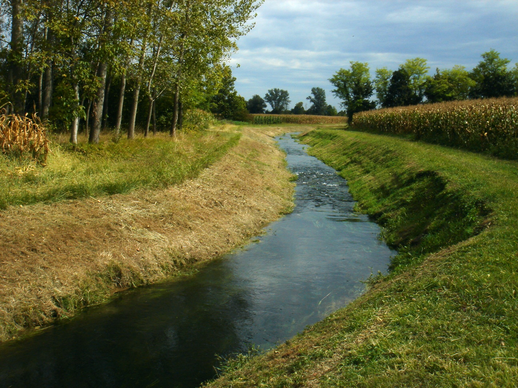 Zoppè di San Vendemiano (Treviso): corso d'acqua nell'area dei palù, a sud del centro abitato, dove nel 2010 passerà l'autostrada A28.